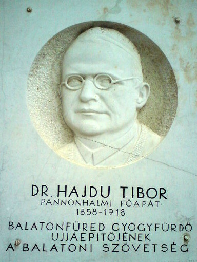 Állami Szívkórház, Balatonfüred